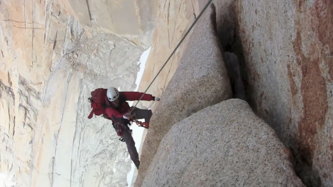 Escalda en Fitz Roy, Chaltén - Argentina